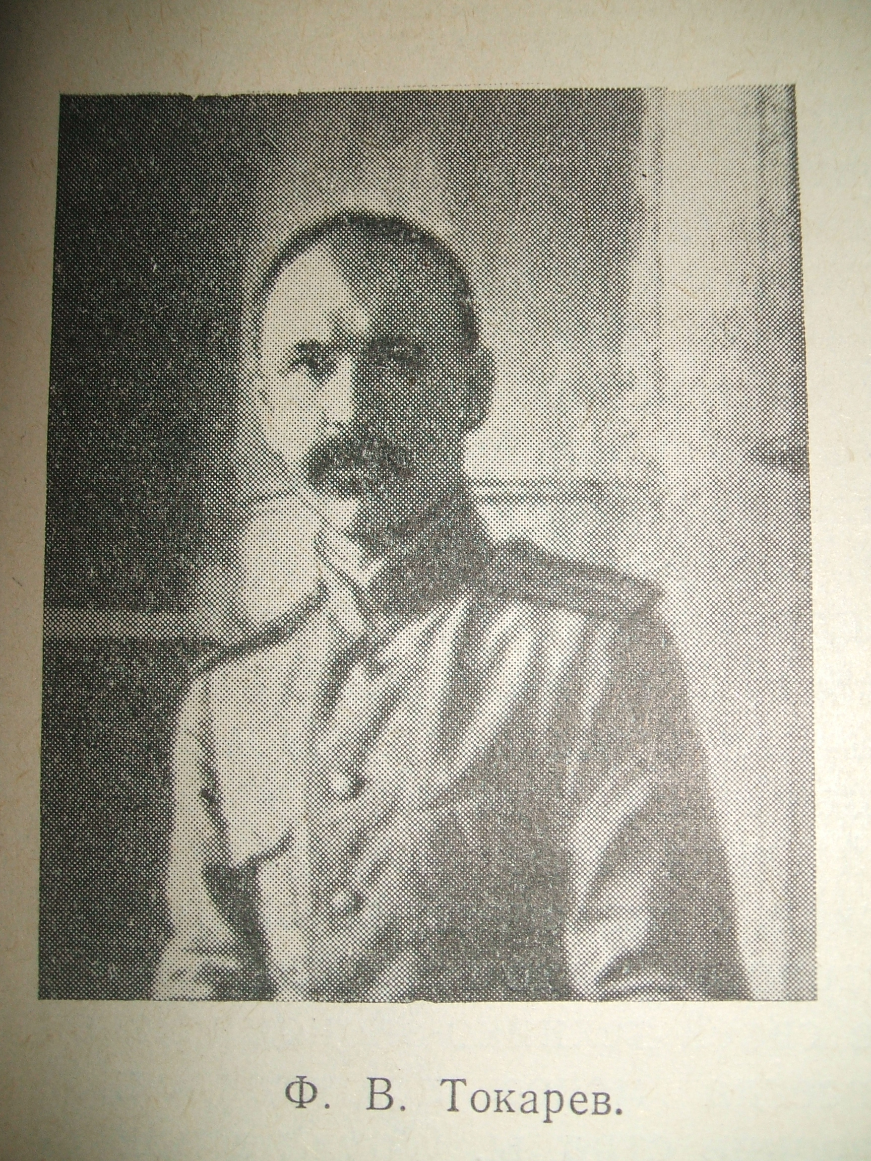 фотография Токарева в начале ХХ века